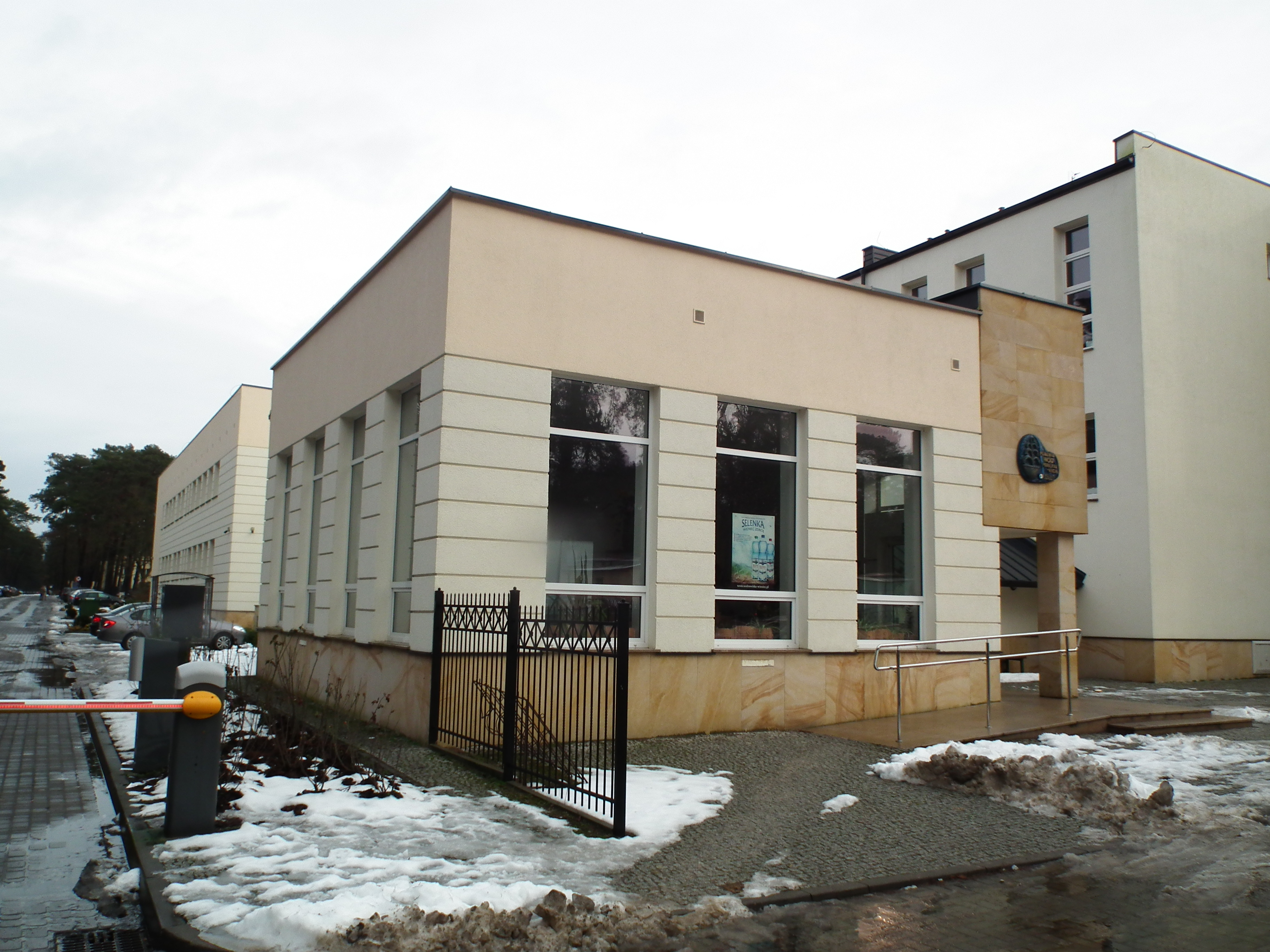 Pijalnia wód w Wieńcu Zdroju.